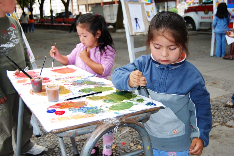 La municipalidad de Talcahuano realizó actividades para niños cuyas familias fueron afectadas por el terremoto de 2010 en Chile.